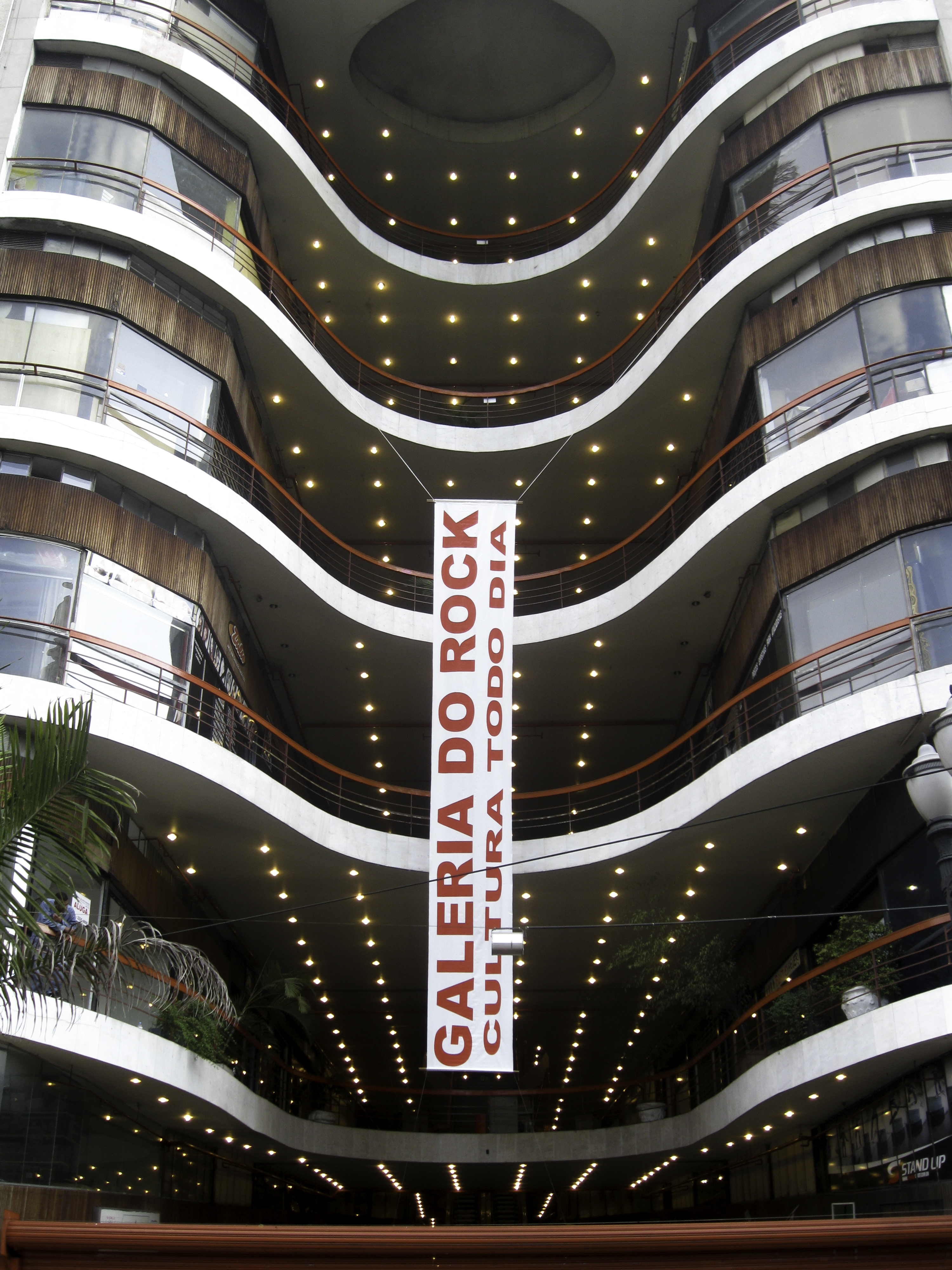 Galeria do Rock na Virada Cultural de 2012